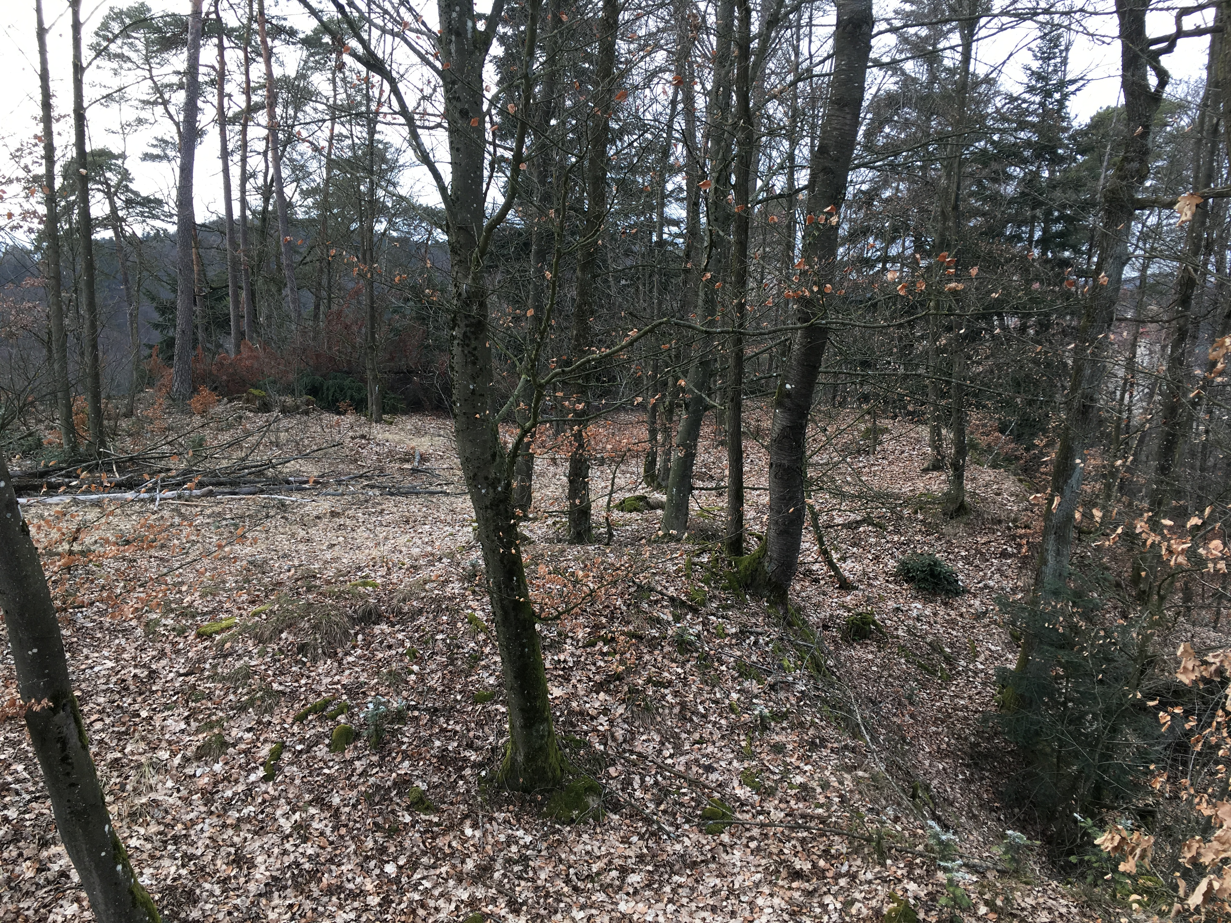 Achatzberg Burgstall Richtung Burg - vom Jägerstand aus fotografiert